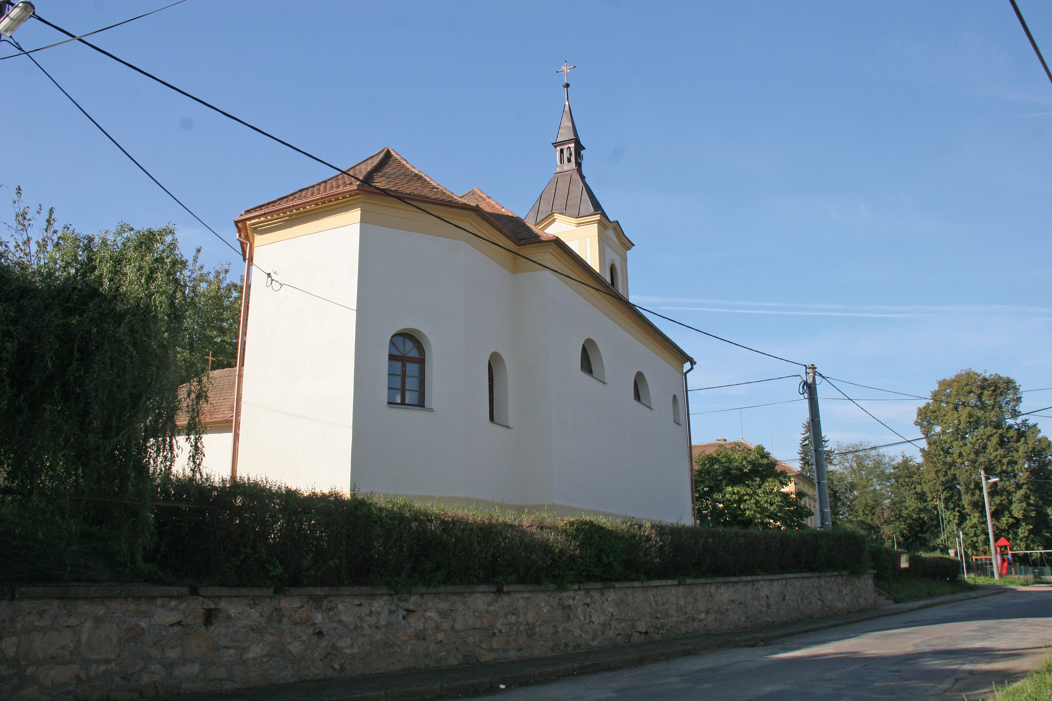 Kaple, náves, Bezkov.